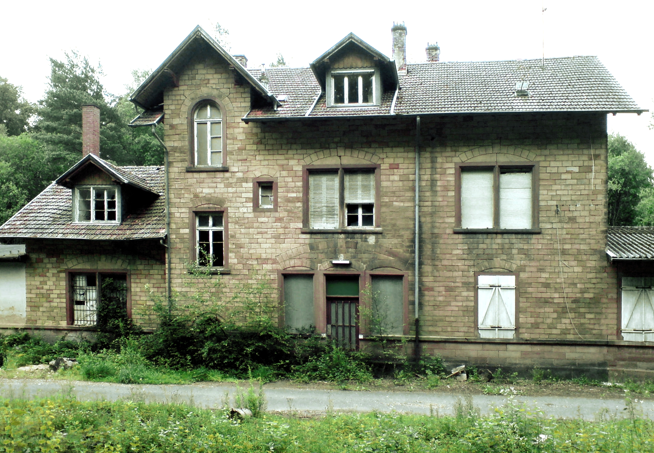 Jägersburger Bahnhof Straßenansicht